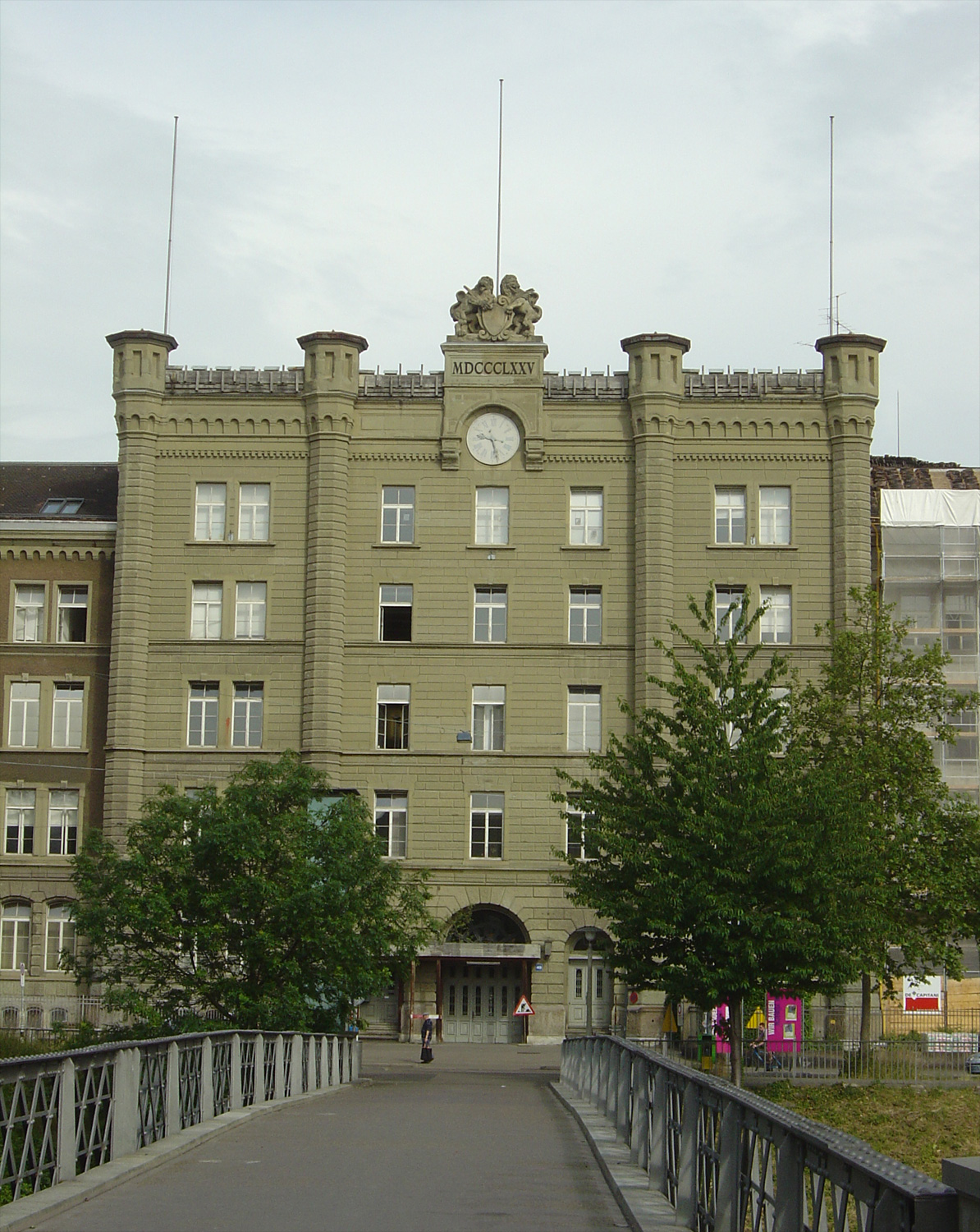 Mitteltrakt der ehemaligen Infanteriekaserne in Zürich